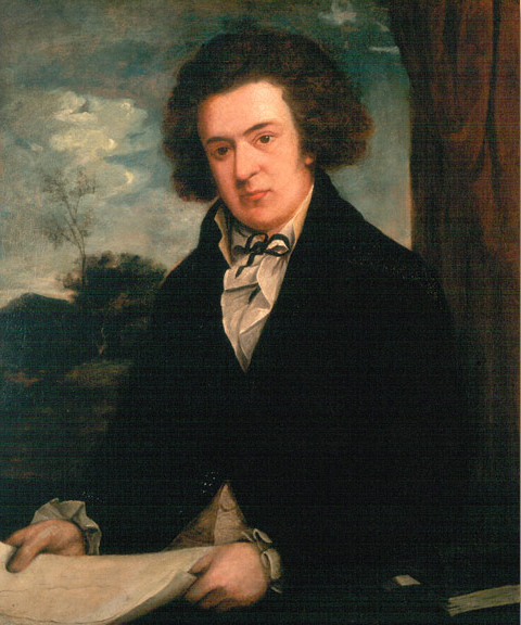 portrait